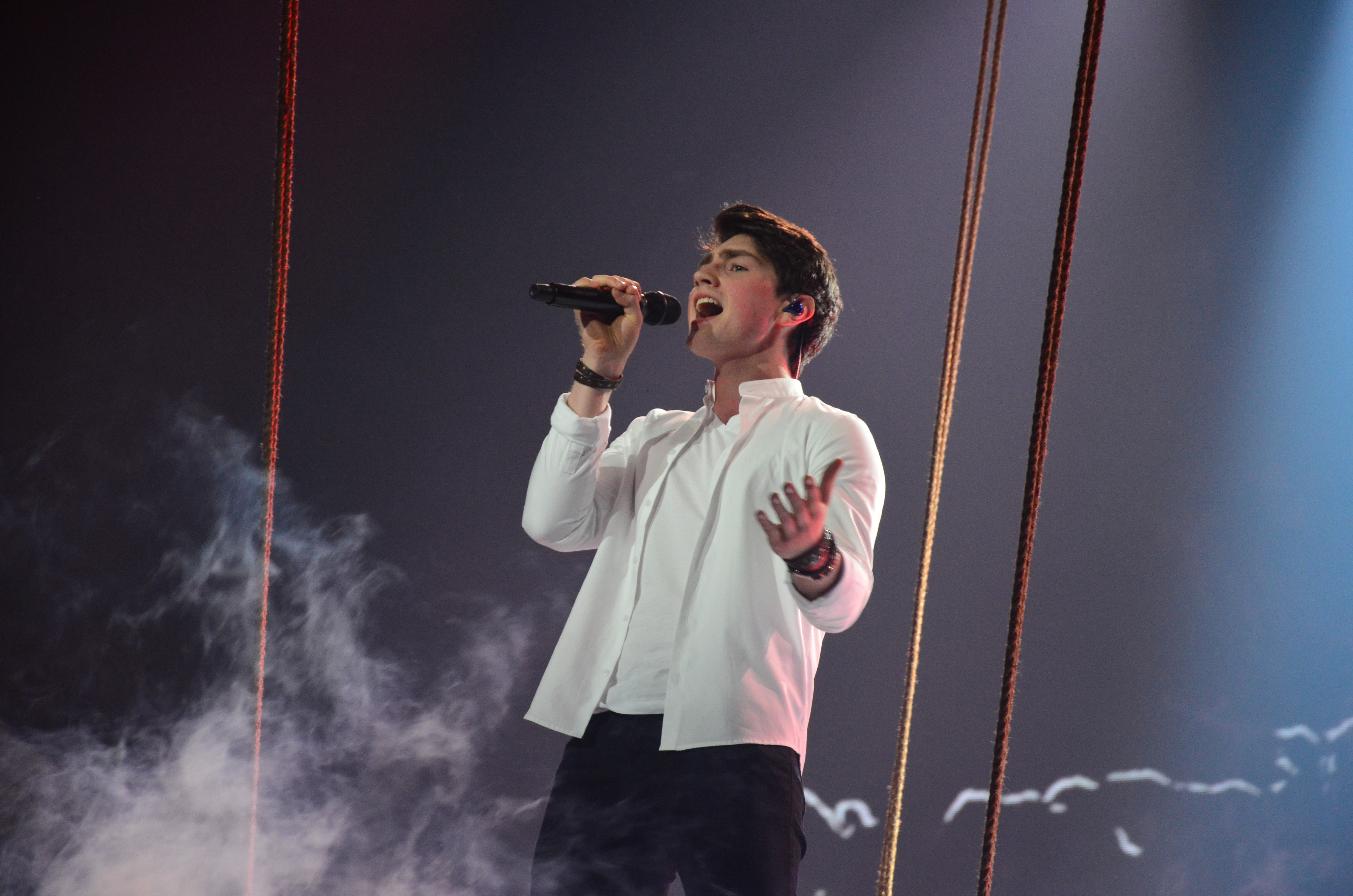 10 травня 2017 року у Києві відбулась генеральна репетиція 2 півфіналу "Євробачення".